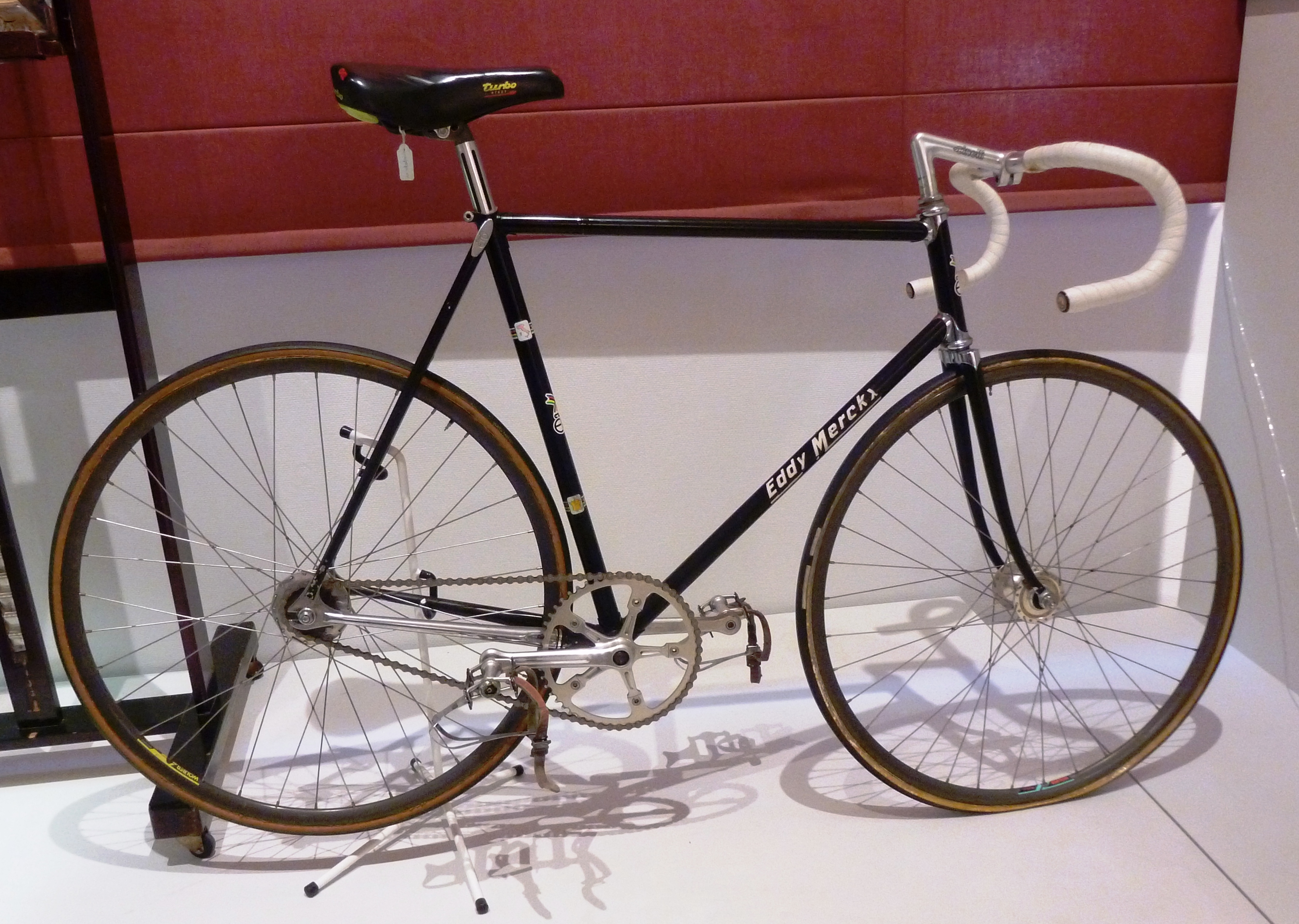 Bahnrad von Eddy Merckx, 1984, im National Wielermuseum in Roeselaere, Belgien